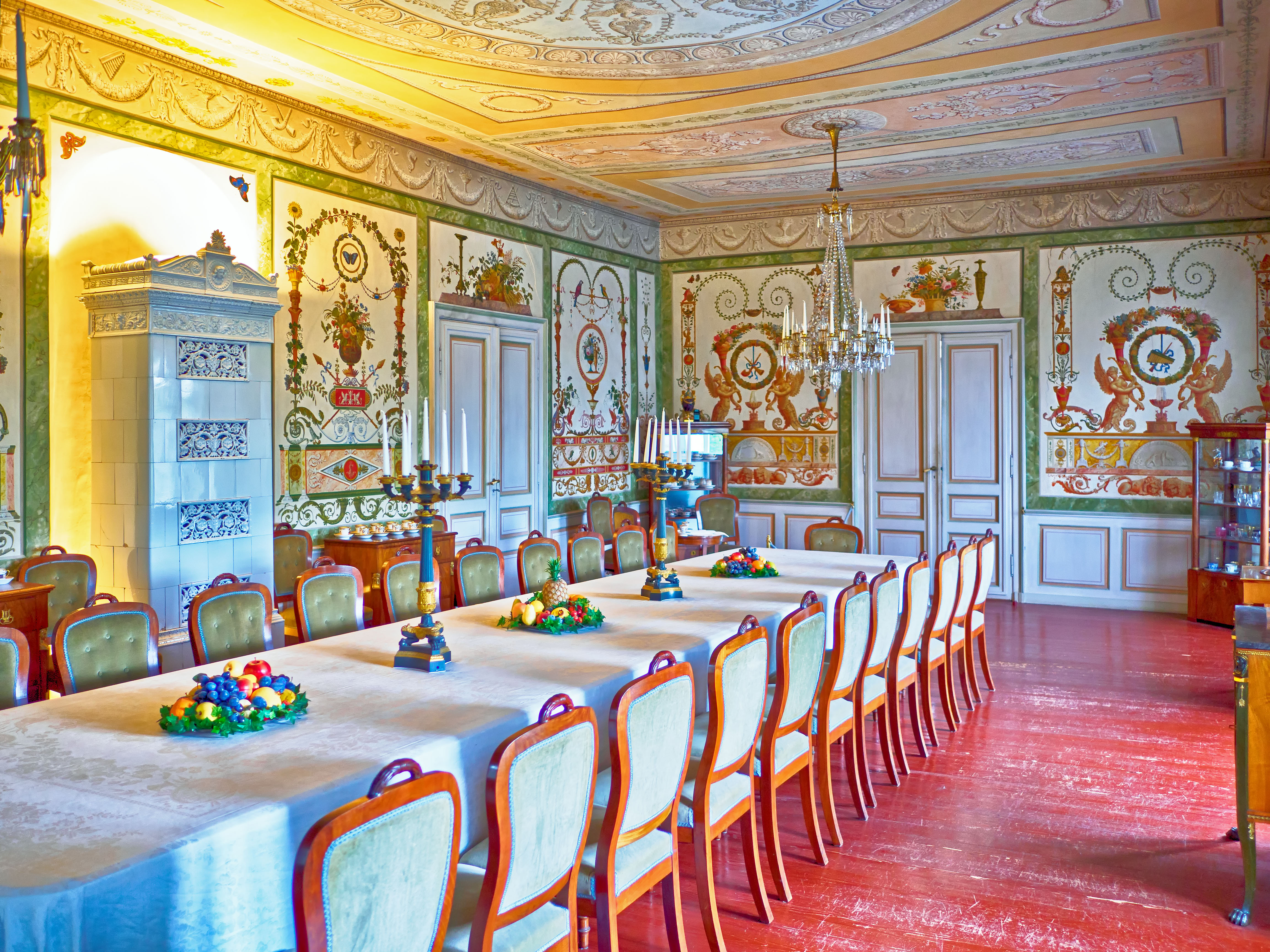 Schloss Bad Homburg - Englischer Flügel -Speisesaal